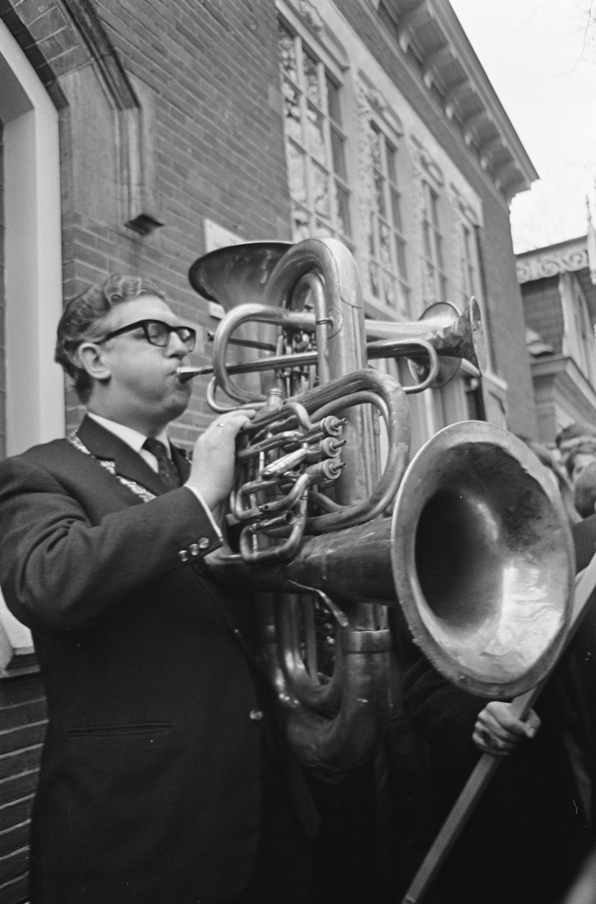 Collectie / Archief : Fotocollectie Anefo Reportage / Serie : [ onbekend ] Beschrijving : Nederlands Studenten Orkest in Ruinekerk te Bergen, Burgemeester L.J. Ruiter van Bergen, speelt op de tuba Datum : 3 januari 1967 Locatie : Bergen Trefwoorden : STUDENTEN, orkesten Fotograaf : Nijs, Jac. de / Anefo Auteursrechthebbende : Nationaal Archief Materiaalsoort : Negatief (zwart/wit) Nummer archiefinventaris : bekijk toegang 2.24.01.05 Bestanddeelnummer : 919-9380